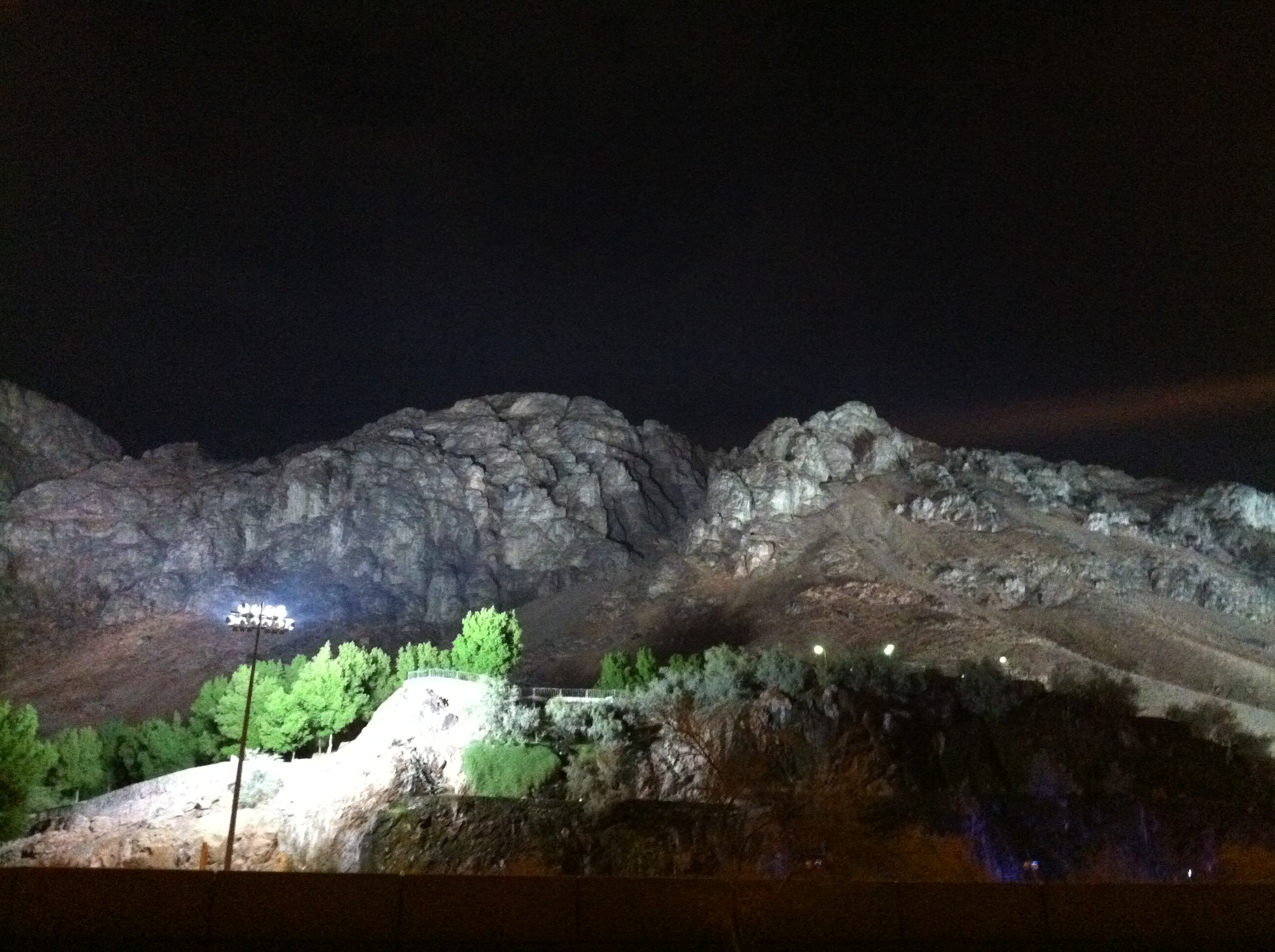 جبل أحد - مساء3